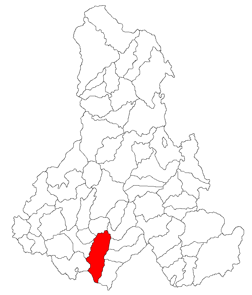 Categorie:Hărţi ale judeţului Harghita Contents 1 Licensing 2 Sursă 3 Licensing 4 Original upload log Licensing Sursă ro::Imagine:Harta_jud_Harghita.png